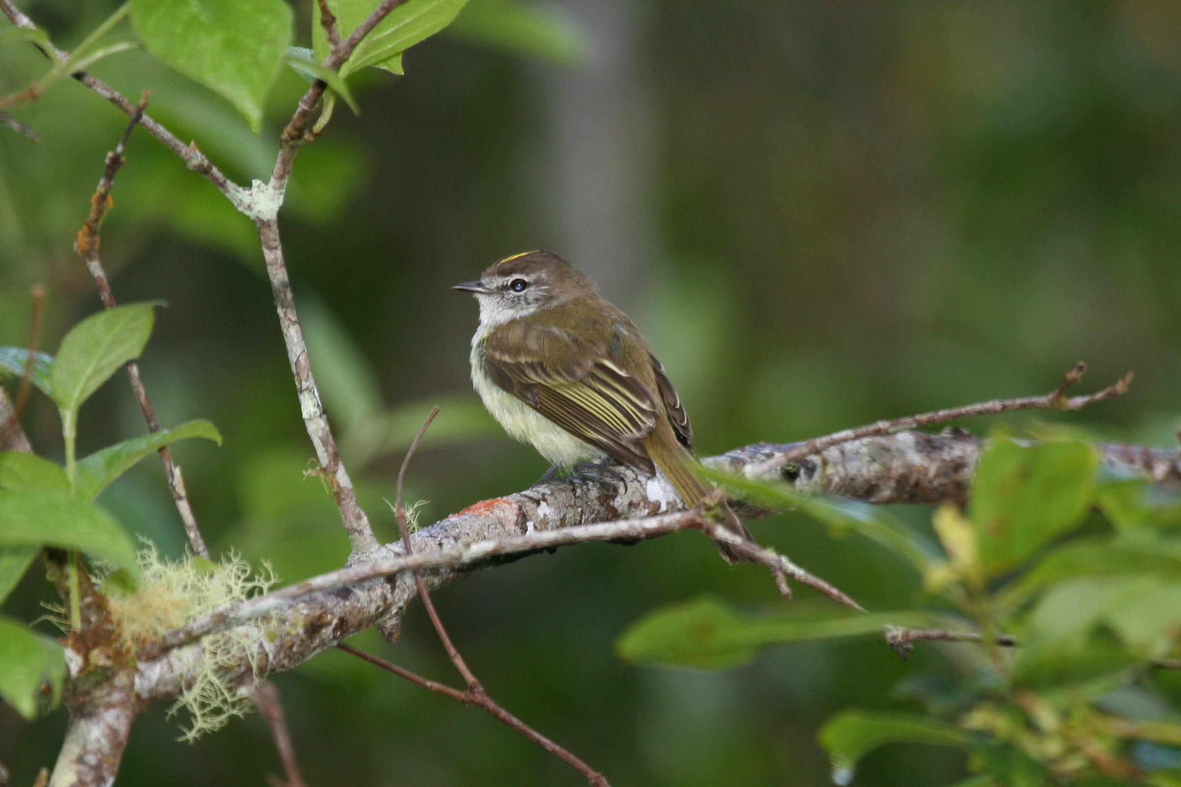 Jamaican Elaenia (Myiopagis cotta)